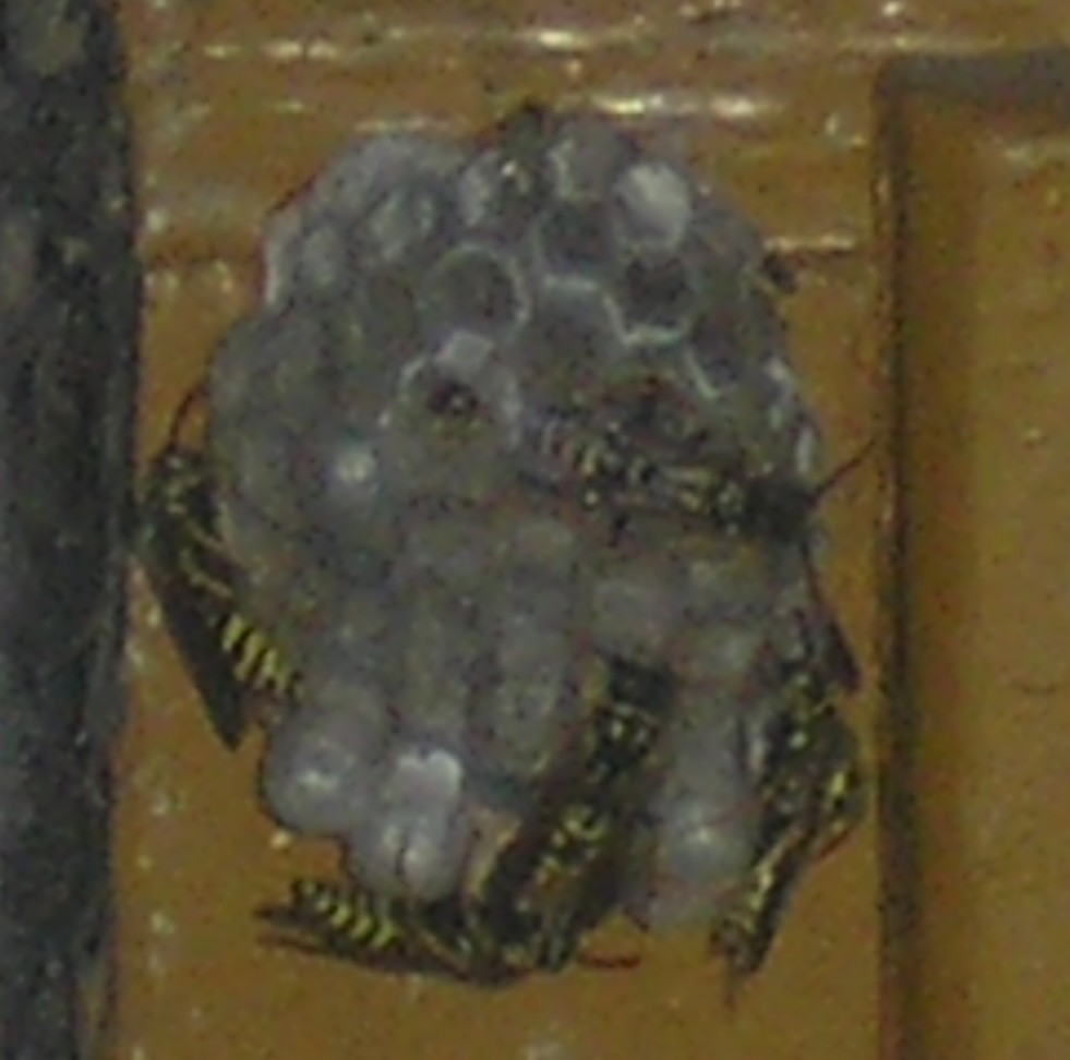 Gniazdo os na ramie okna.